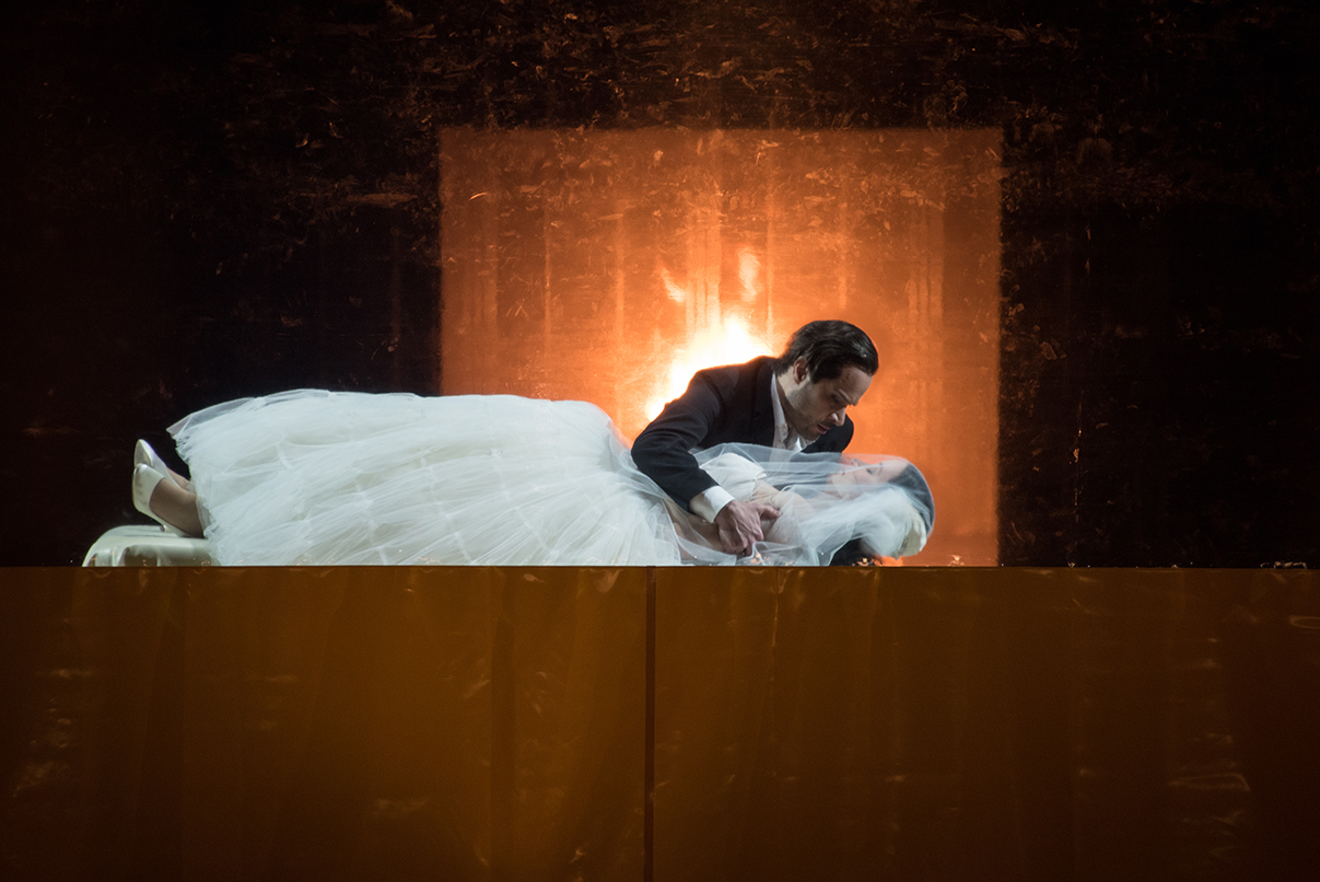 Bejun Mehta, Anna Prohaska, Orfeo ed Euridice, Staatsoper Berlin, 2016 Regie: Jürgen Flimm Dirigent: Daniel Barenboim Bühnenbild in Kooperation mit Gehry Partners, LLP Kostüm: Florence von Gerkan